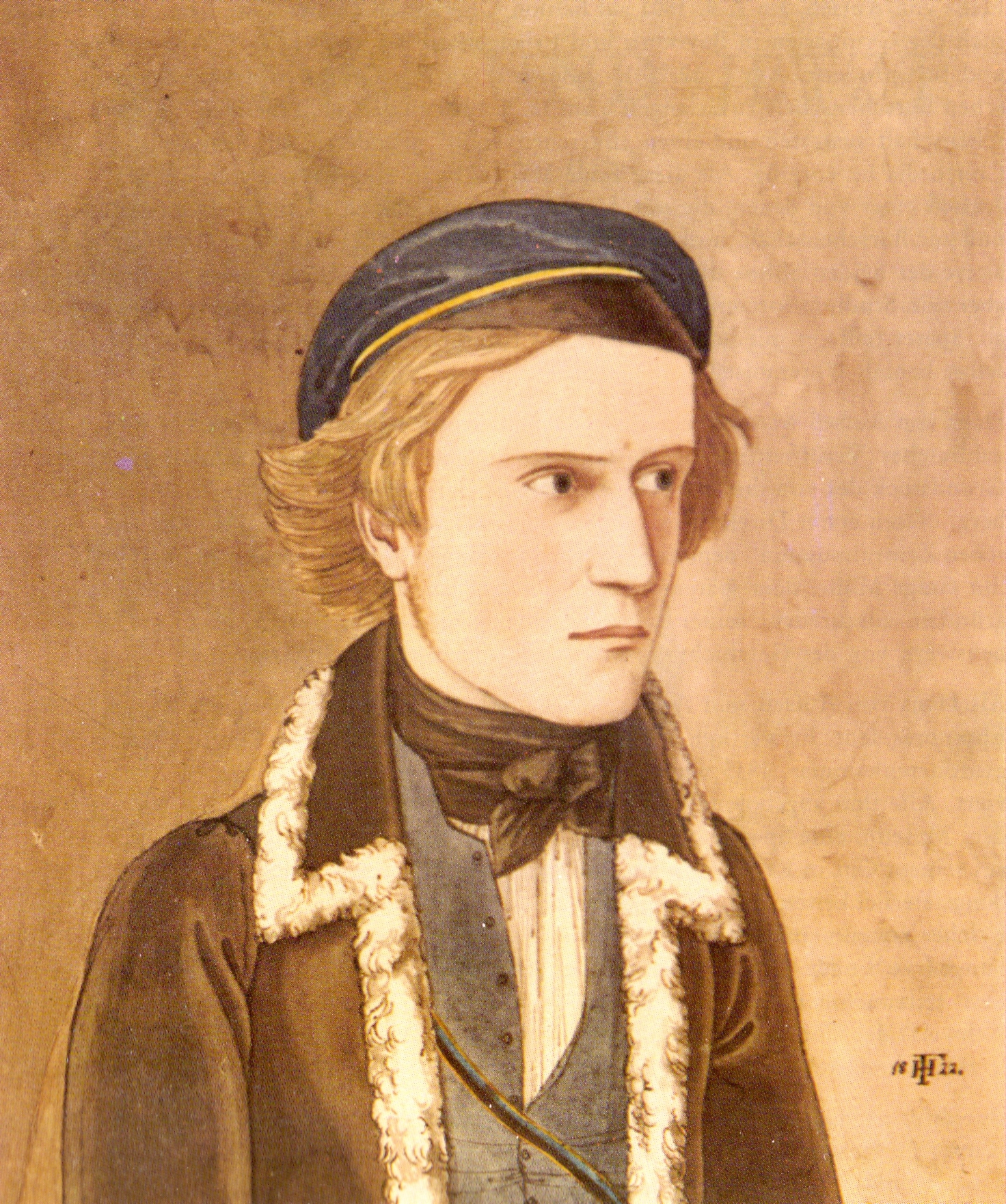 Porträt des Dr. iur. et phil. Hans Freiherr von und zu Aufseß als Student 1822 in Erlangen in Couleur seiner Studentenverbindung Concordia Erlangen (Vgl. Ernst Meyer-Camberg: Die Concordia zu Erlangen 1820-1821 in: EuJ 30 (1985) S. 19 ff.; Bestandteil des Stammbuches Hoffstadt im Familienarchiv Aufseß